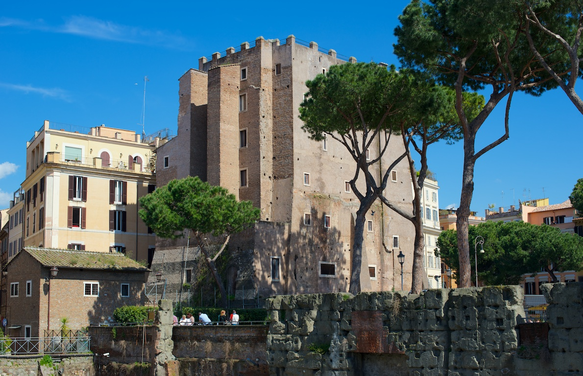 KAM_0454